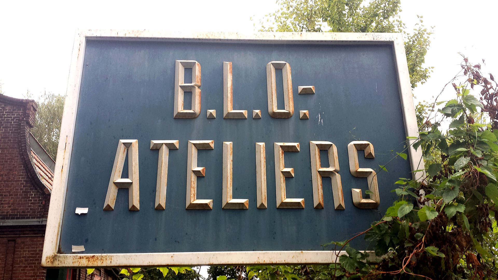 Das Schild am Eingang der B.L.O.-Ateliers in Berlin.